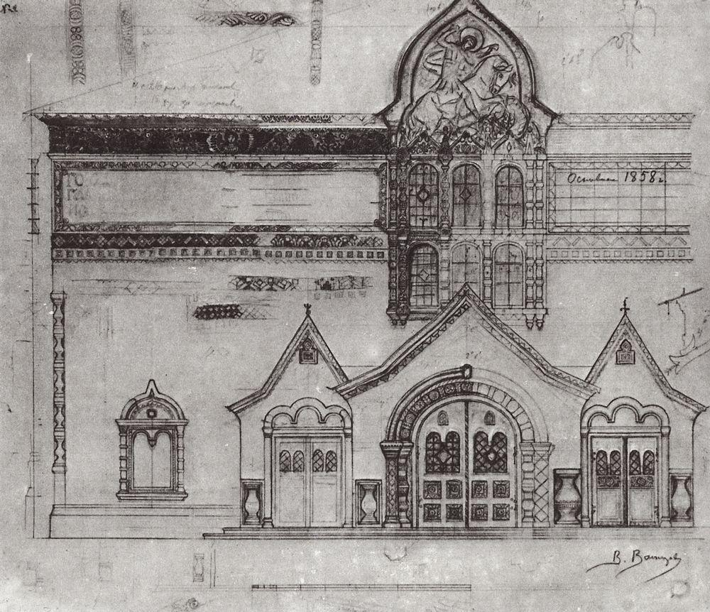 Проект фасада Третьяковской галереи